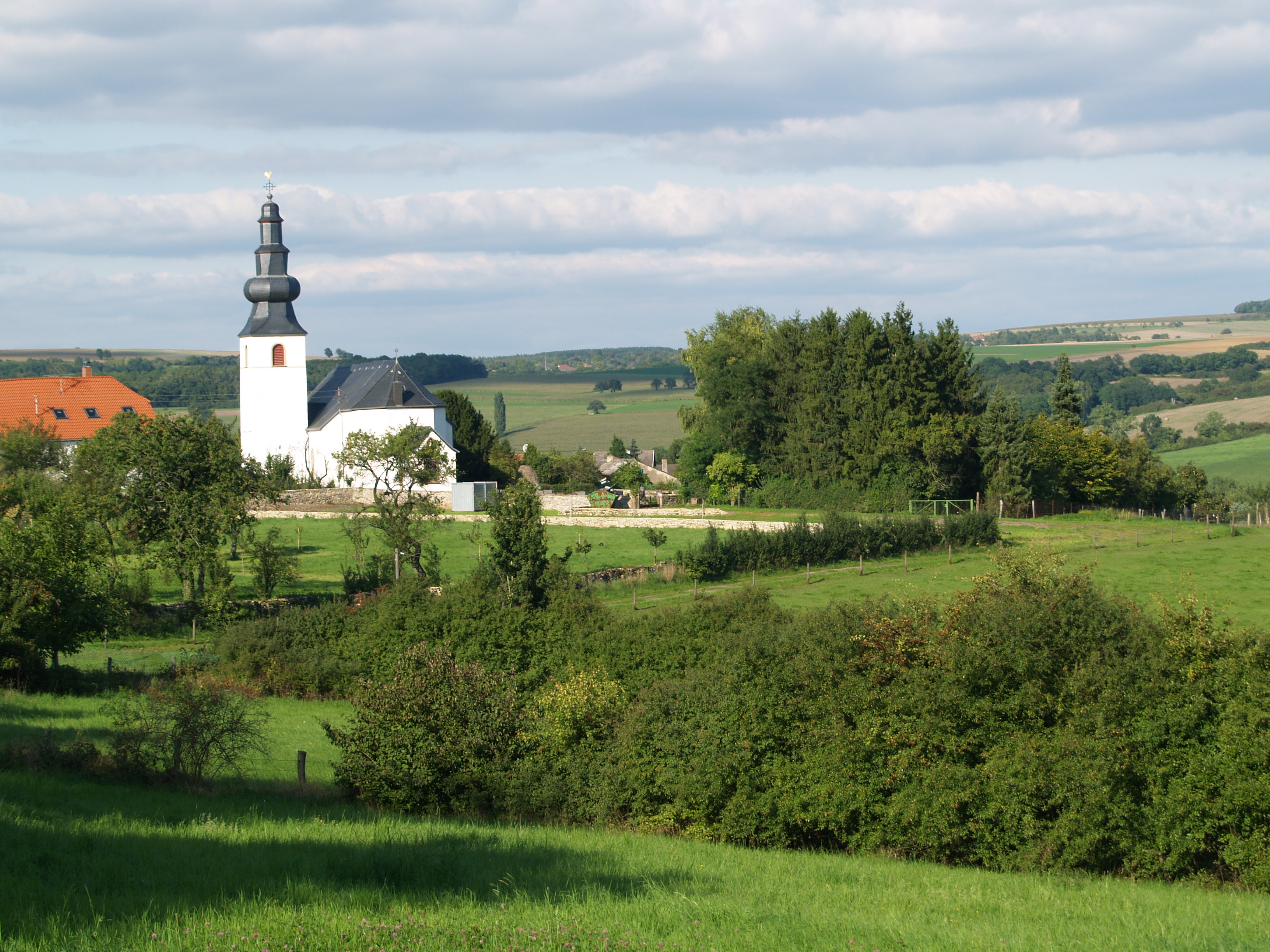 Leidingen (Kirche)